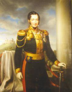 Ernesto I de Saxe-Coburgo-Gota (1784-1844)